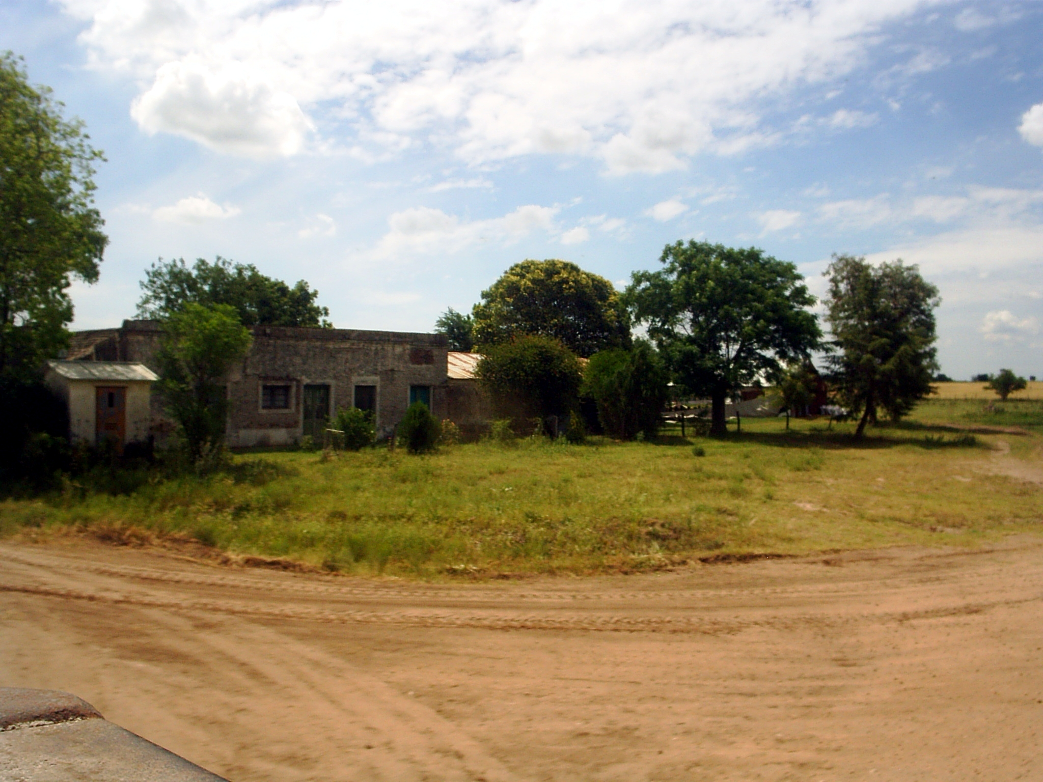 Esquina con vivienda tipo pulperia, camino de la costa Aldea Asuncion.